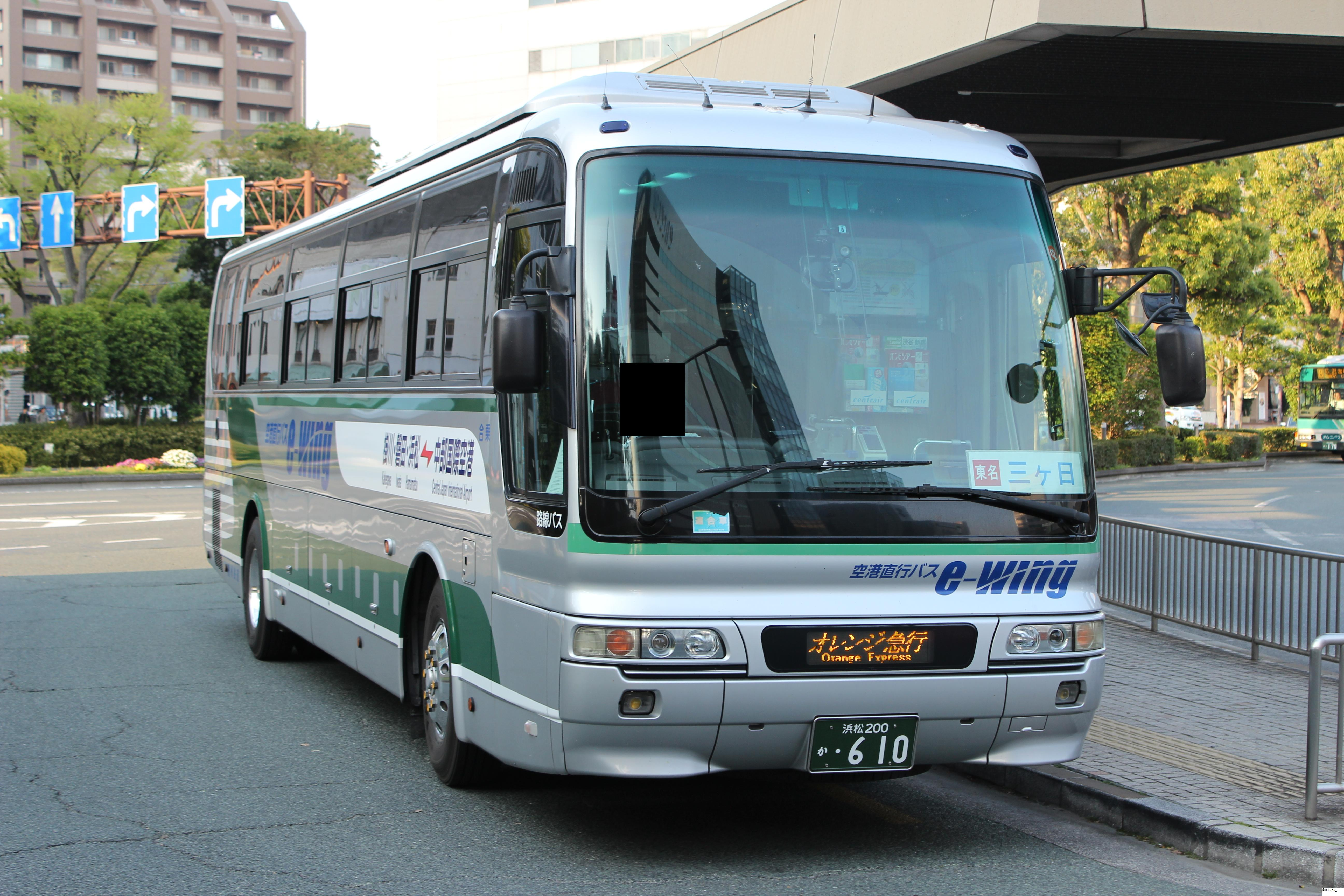 浜松駅バスターミナルで待機する610号車、浜松200か・610